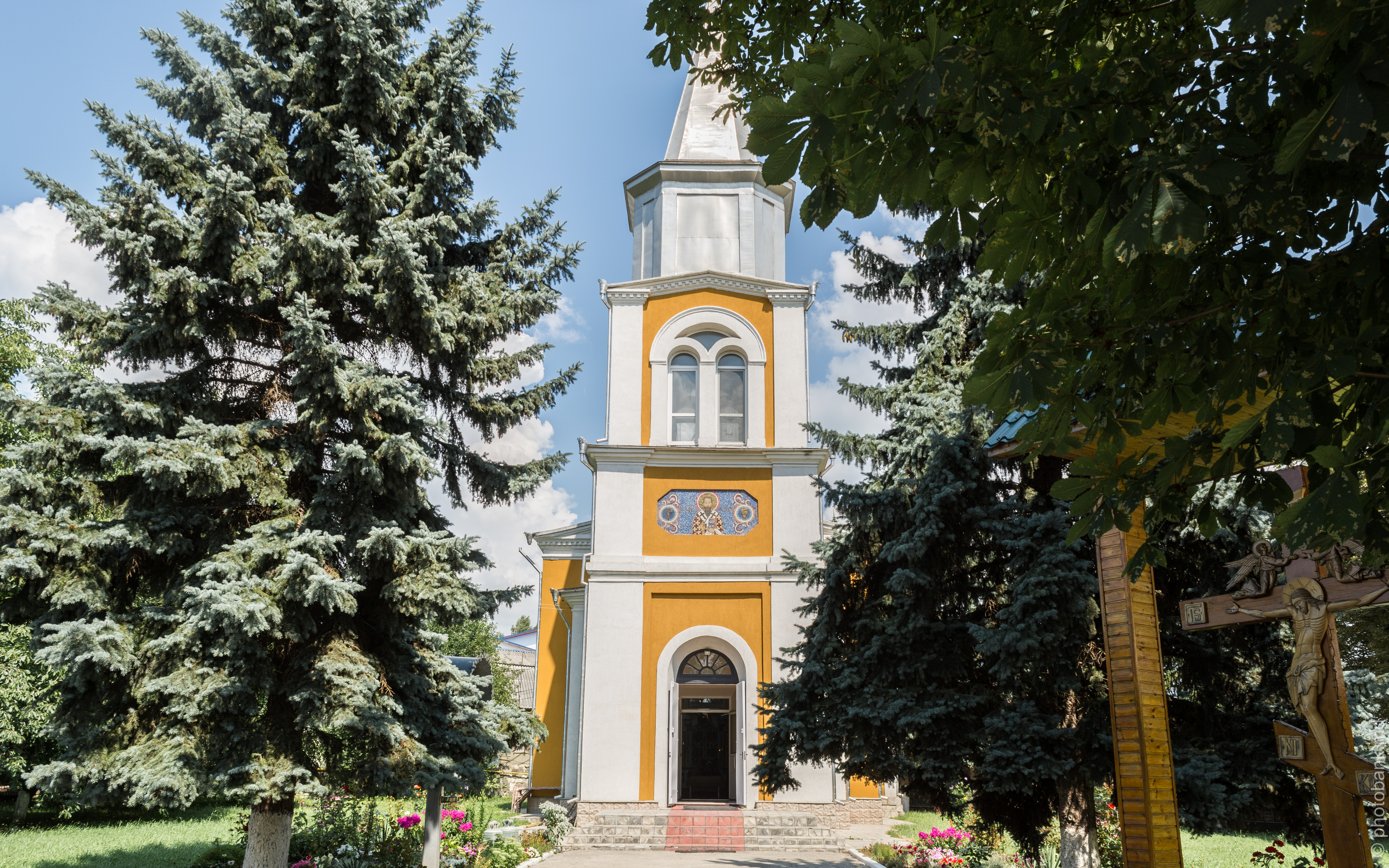 Адрес: Единцы, ул. Максима Горького 3/2